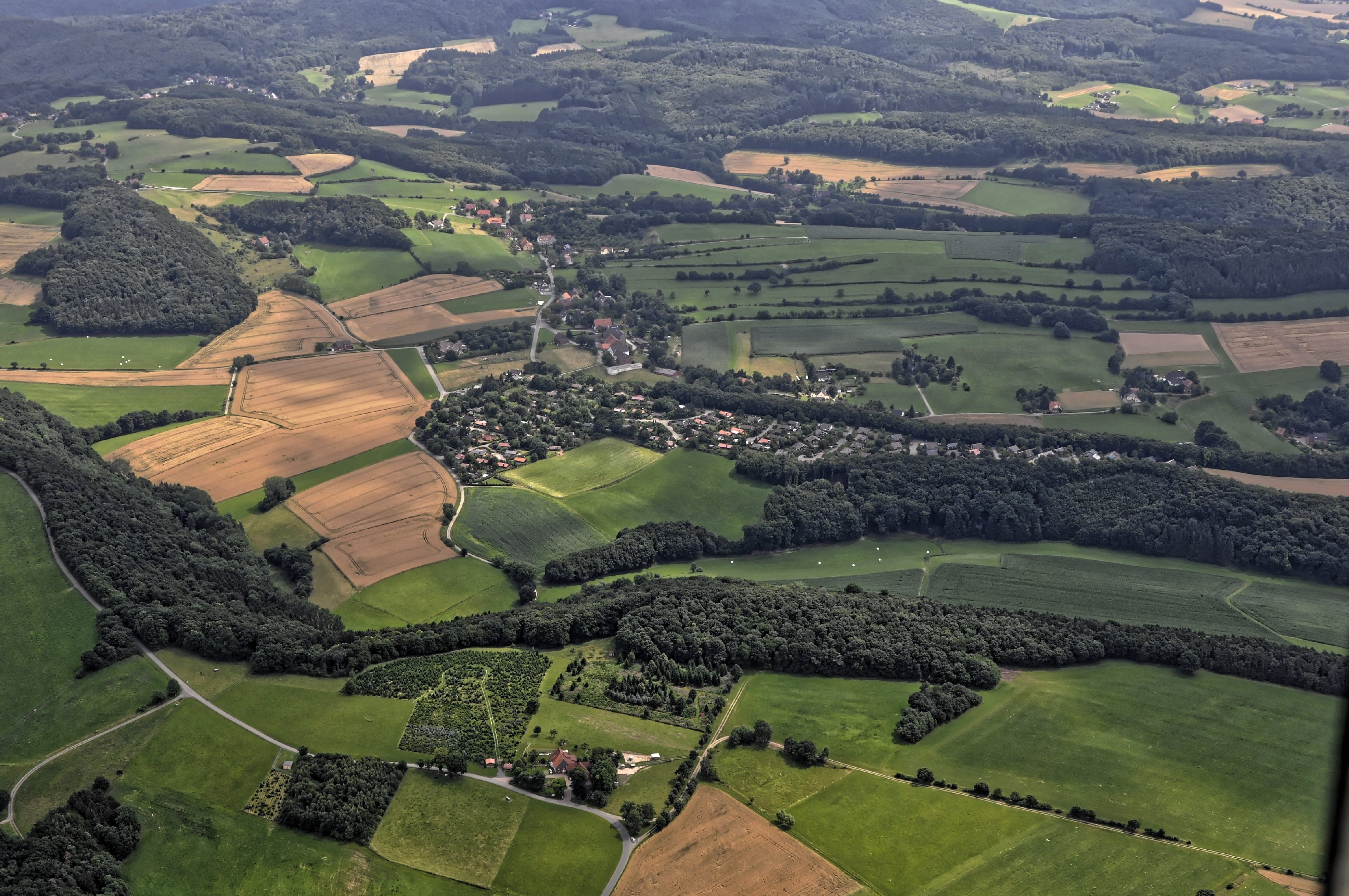 Bilder vom Flug Nordholz Hammelburg 2015